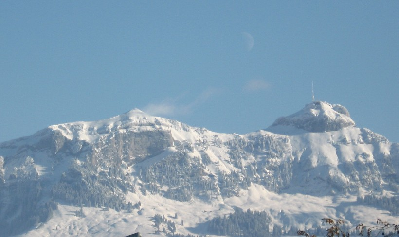 Kamor links und Hoher Kasten rechts von Appenzell gesehen